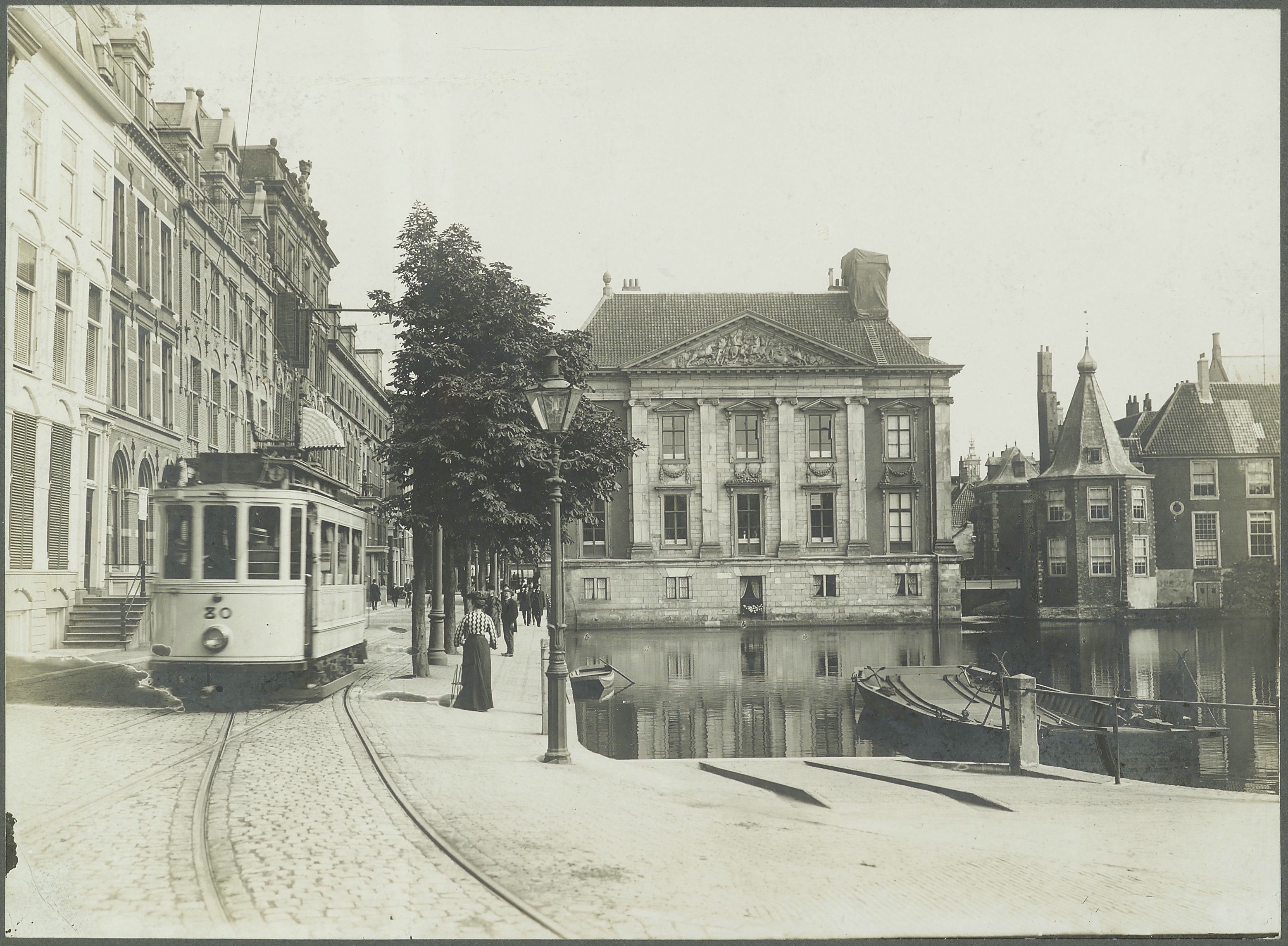 Mauritshuis: Zicht langs Korte Vijverberg op achtergevel en torentje (opmerking: Tram en mensen op straat)Motorwagen 80 op de Haagse tramlijn 1 op de Korte Vijverberg ter hoogte van het Haags Historisch Museum, met zicht op het Mauritshuis en het Torentje; circa 1910.